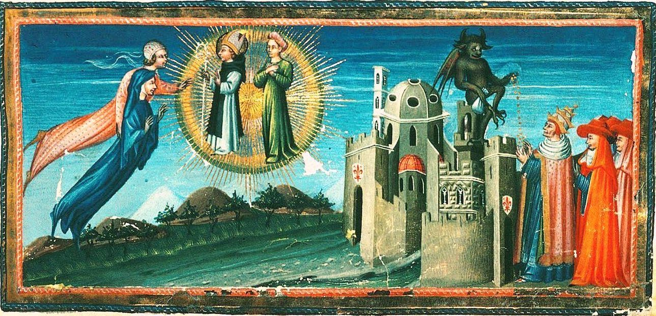 Divine Comedy, paradise, canto IX (Dante) by Giovanni di Paolo